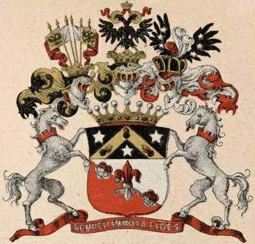 Vorontsovi suguvõsa krahvivapp